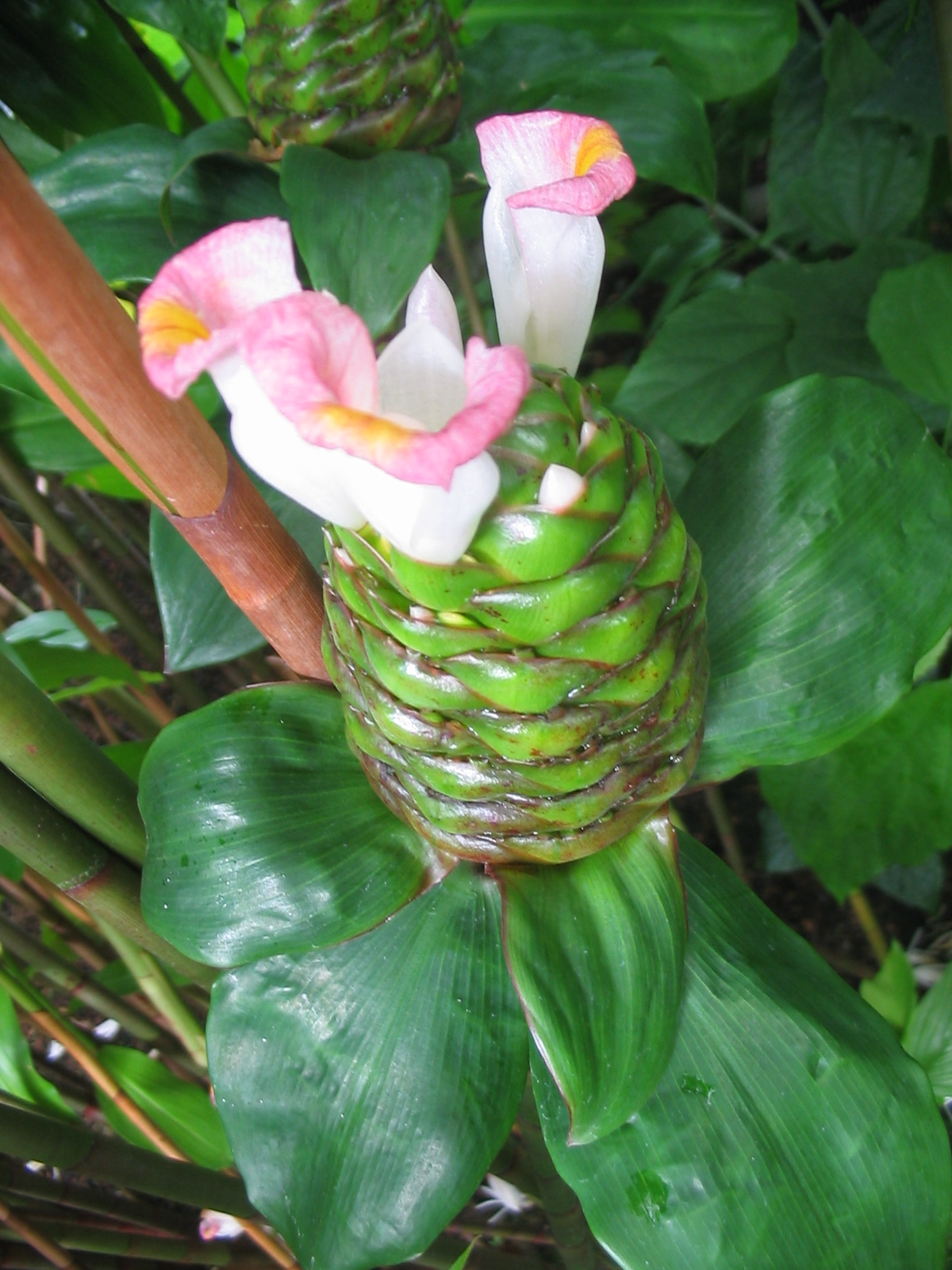 Costus afer - Blüte - Bot. Garten Edinburgh